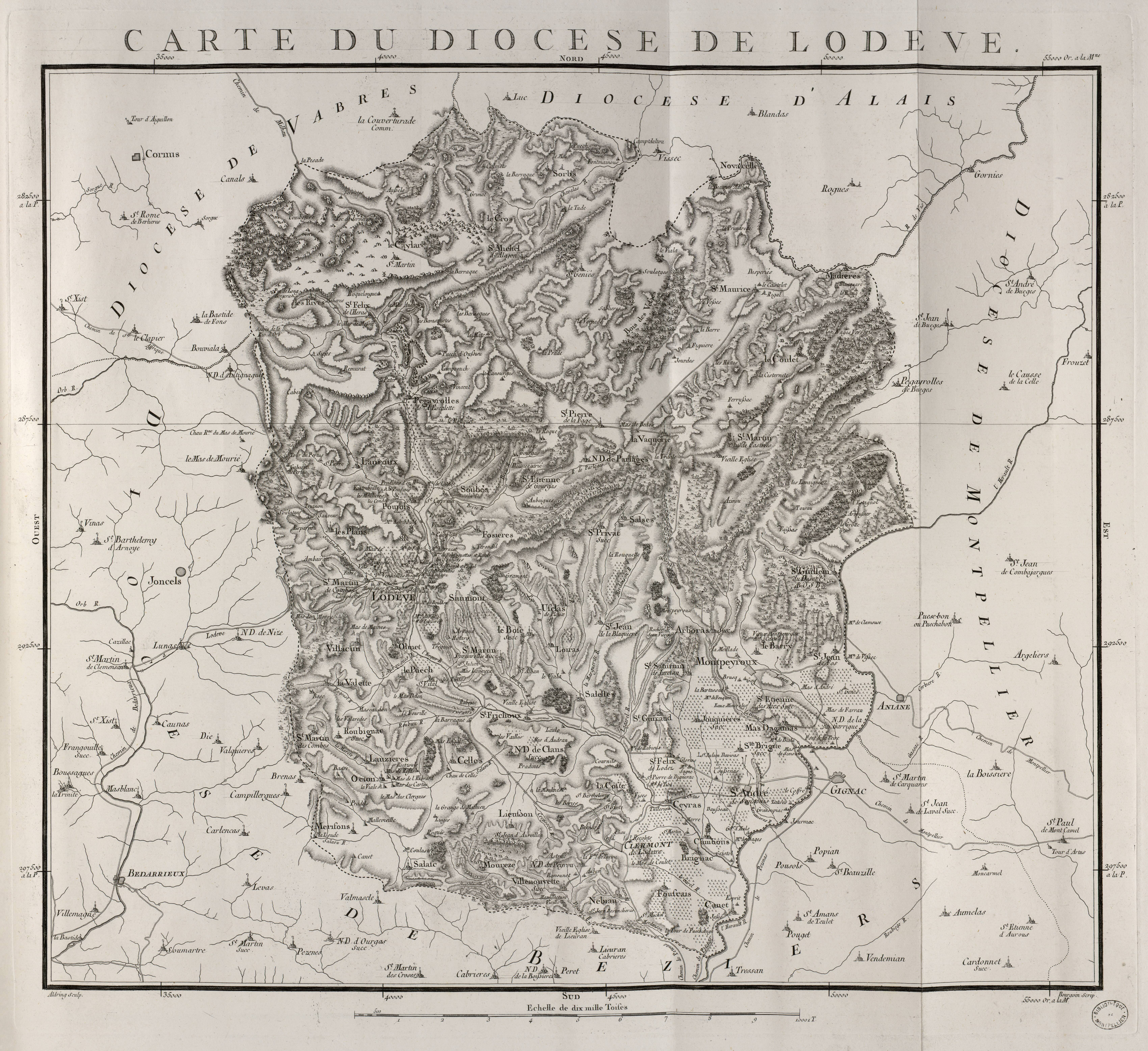 Carte du diocèse de Lodève, extraite de Diocèses de la province du Languedoc (1781)